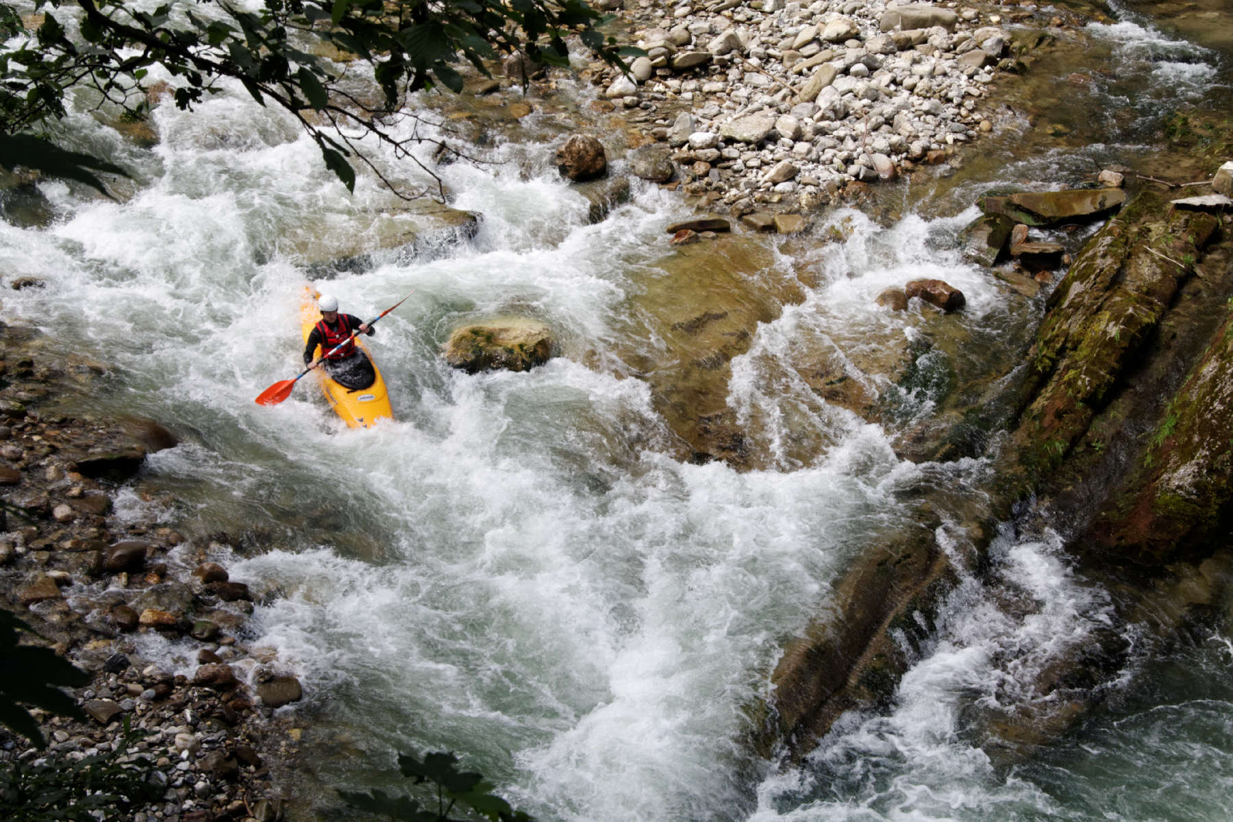 Saulgrub, Kanufahrer auf der Ammer am Eintritt in die Scheibum